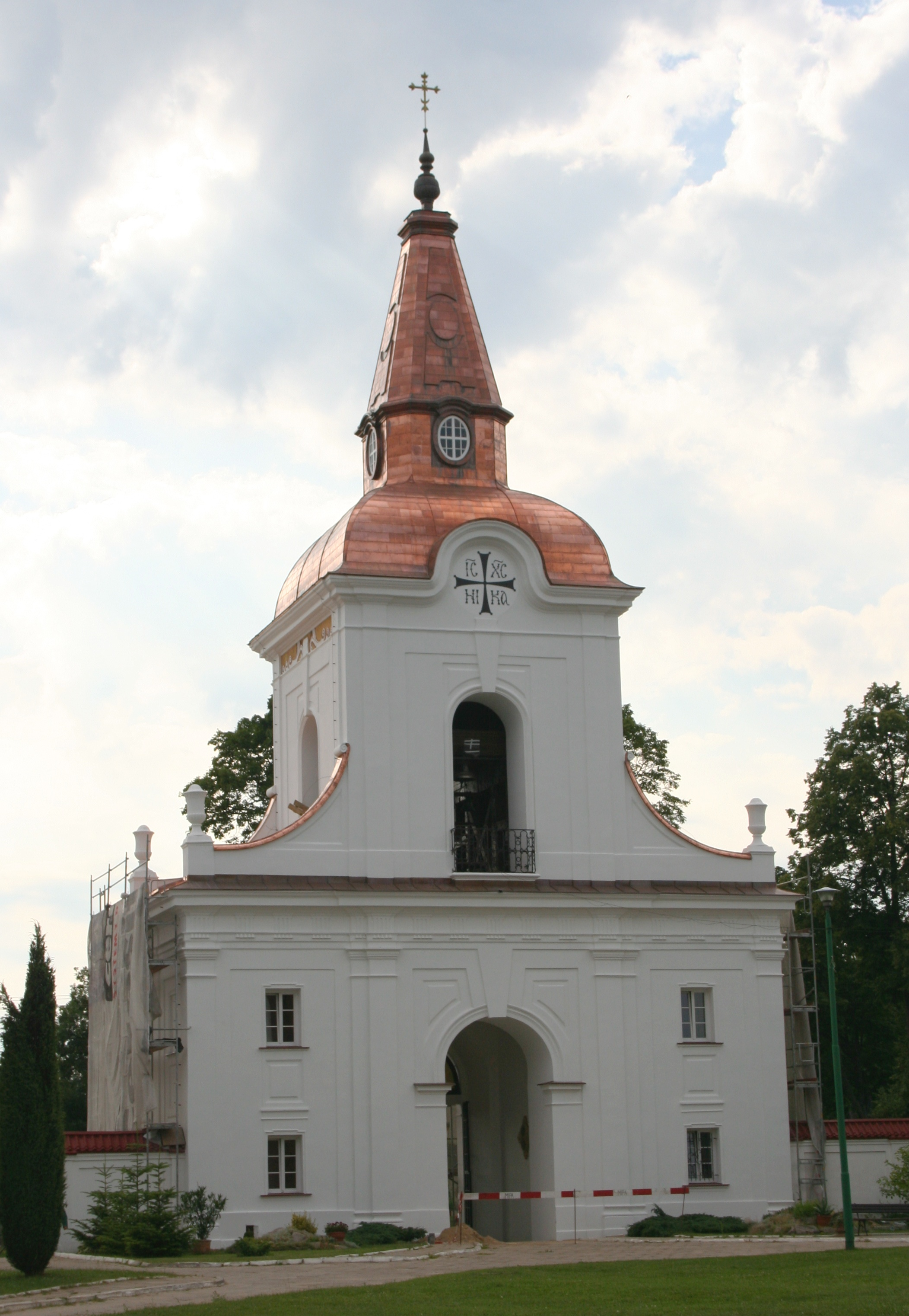 Supraśl - brama wjazdowa (brama-dzwonnica) w zespole klasztornym bazylianów, 1752